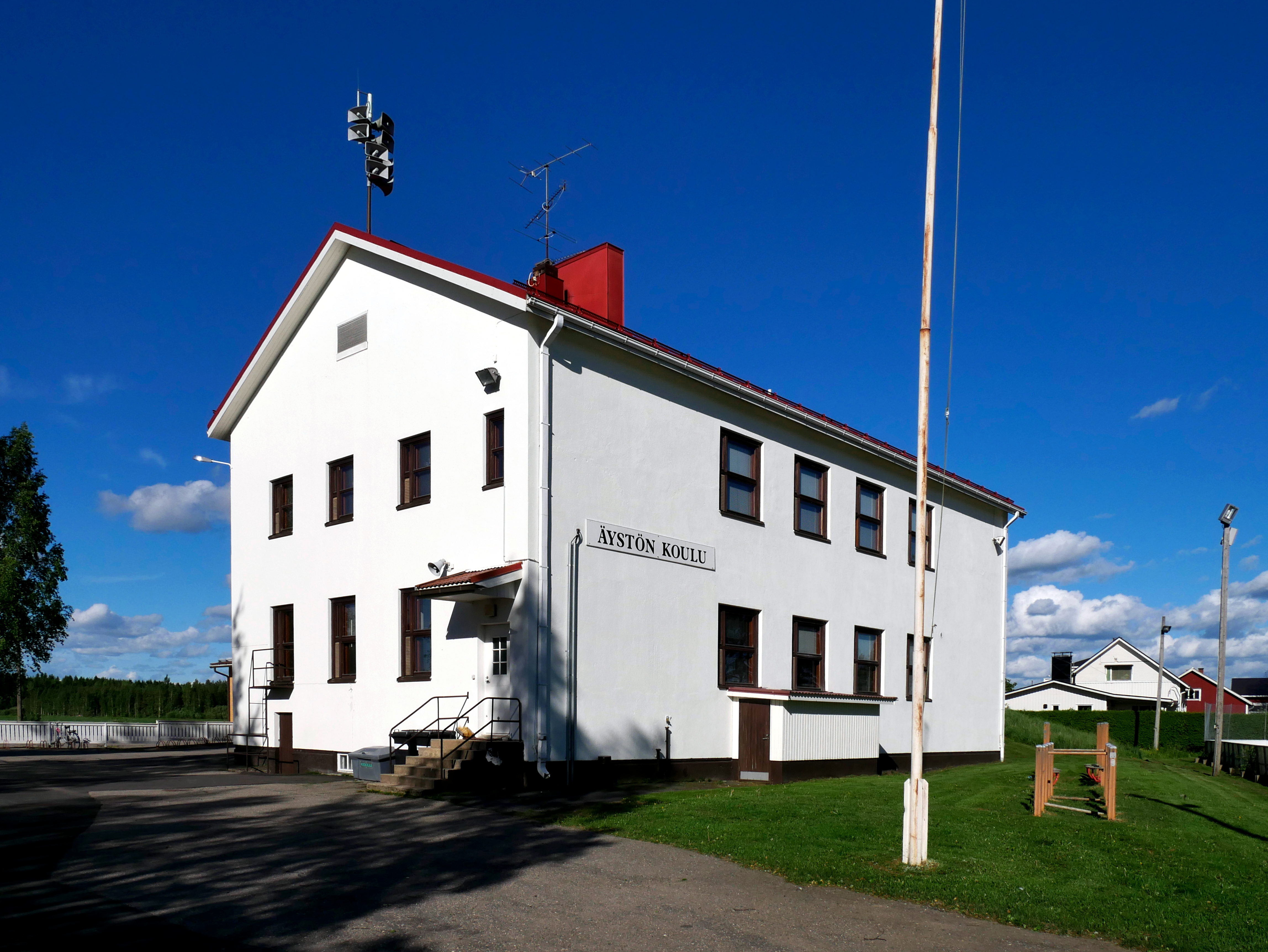 Äystön koulu Teuvalla.